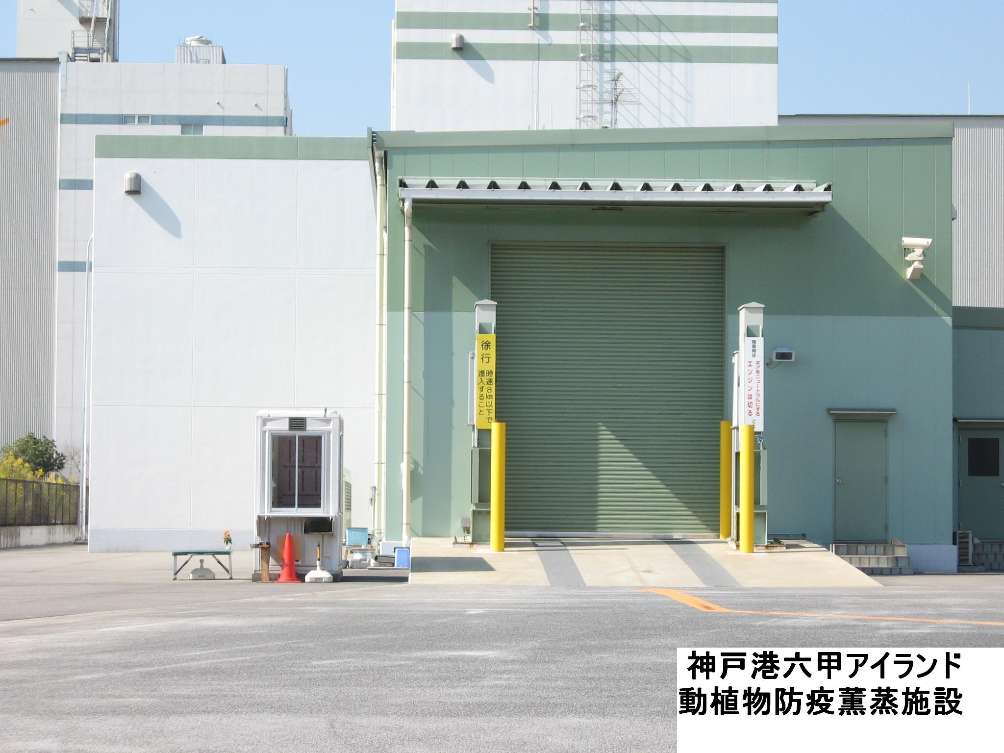 関連資料画像。